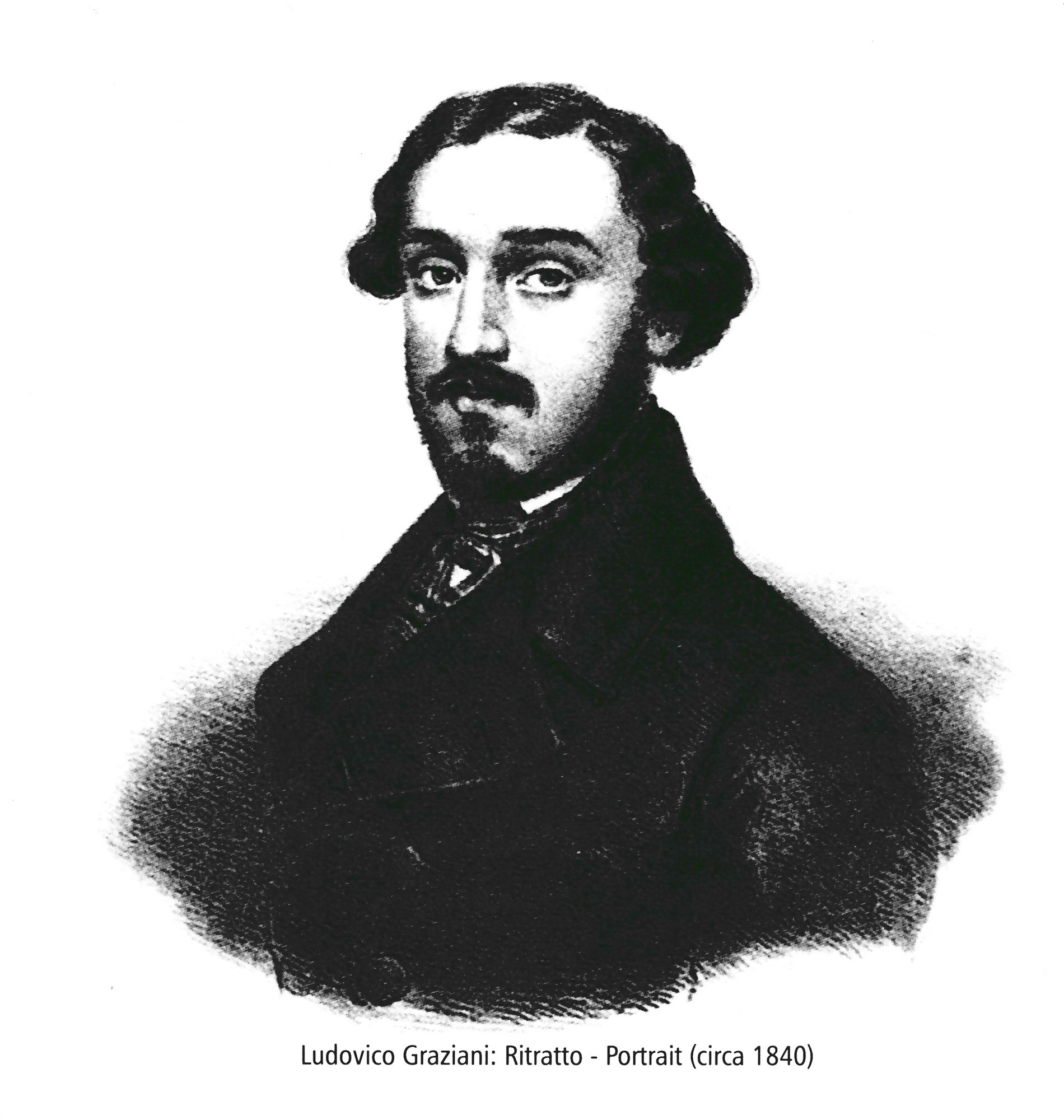 Portrait du ténor Lodovico Graziani (daté de 1840 environ), créateur du rôle d'Alfredo Germont de La Traviata, à la Fenice de Venise